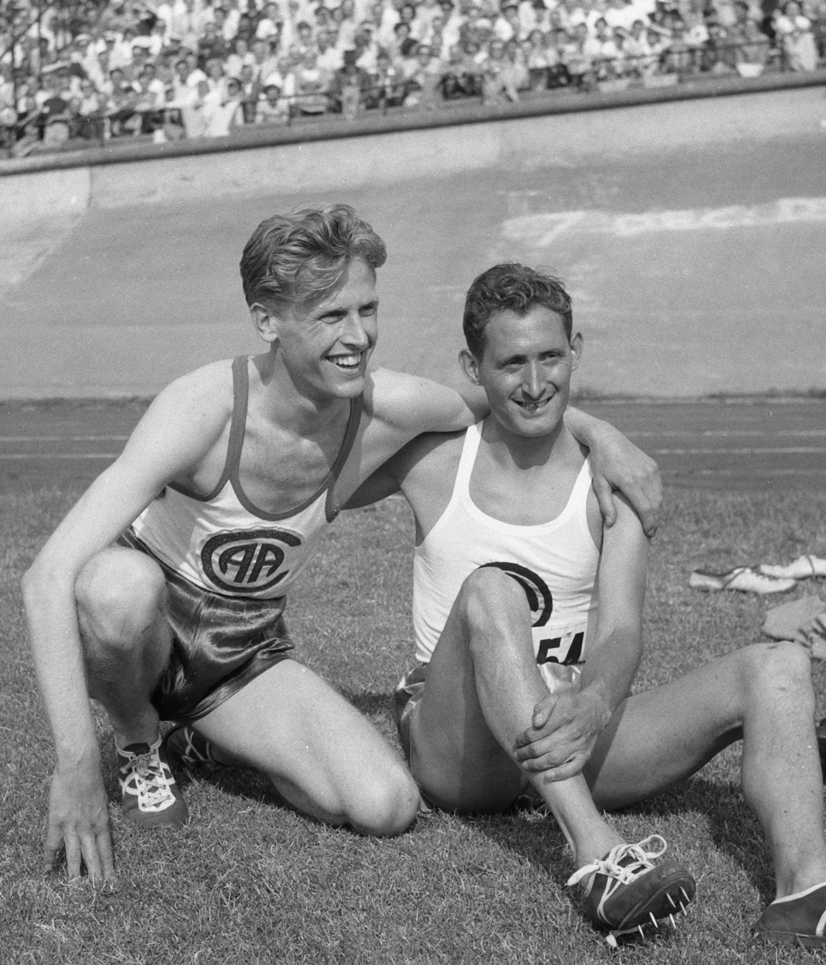 Olympische dag Hans Harting tegen Slijkhuis